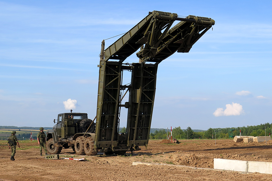 ТММ-3М1 - Предварительное прохождение конкурса «Безопасный маршрут» командами-участницами Армейских международных игр-2015